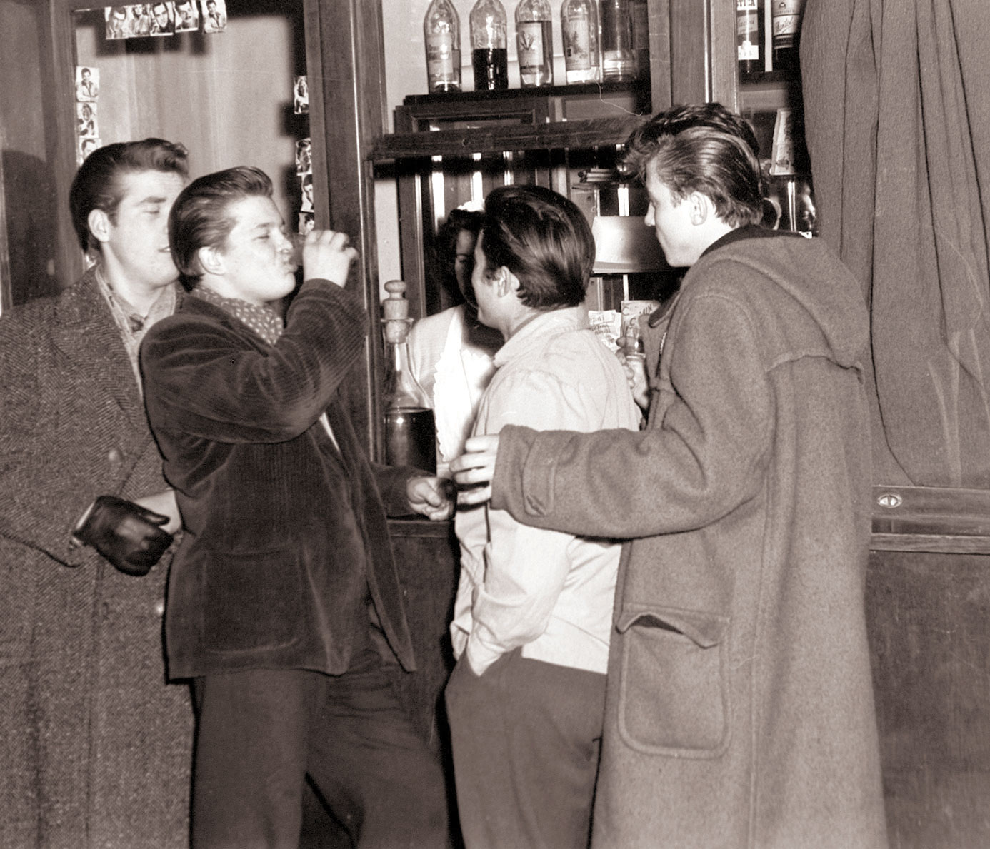 Bife pri grajskem kinu.